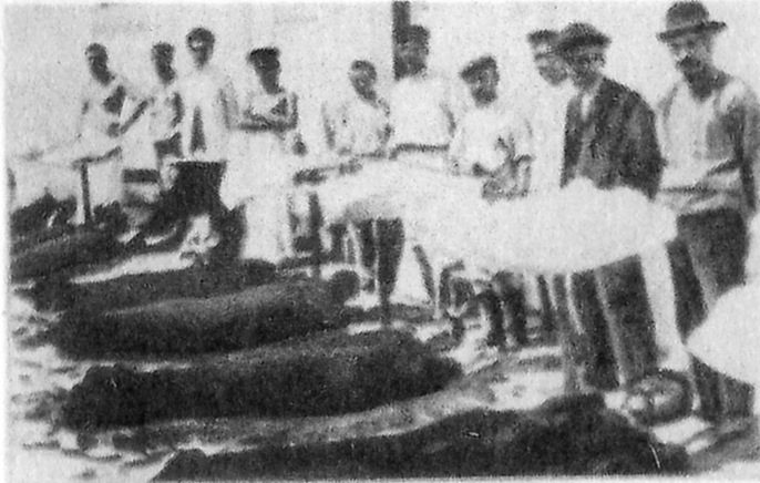 Грязелечебница "Мойнаки". Конец XIX в.